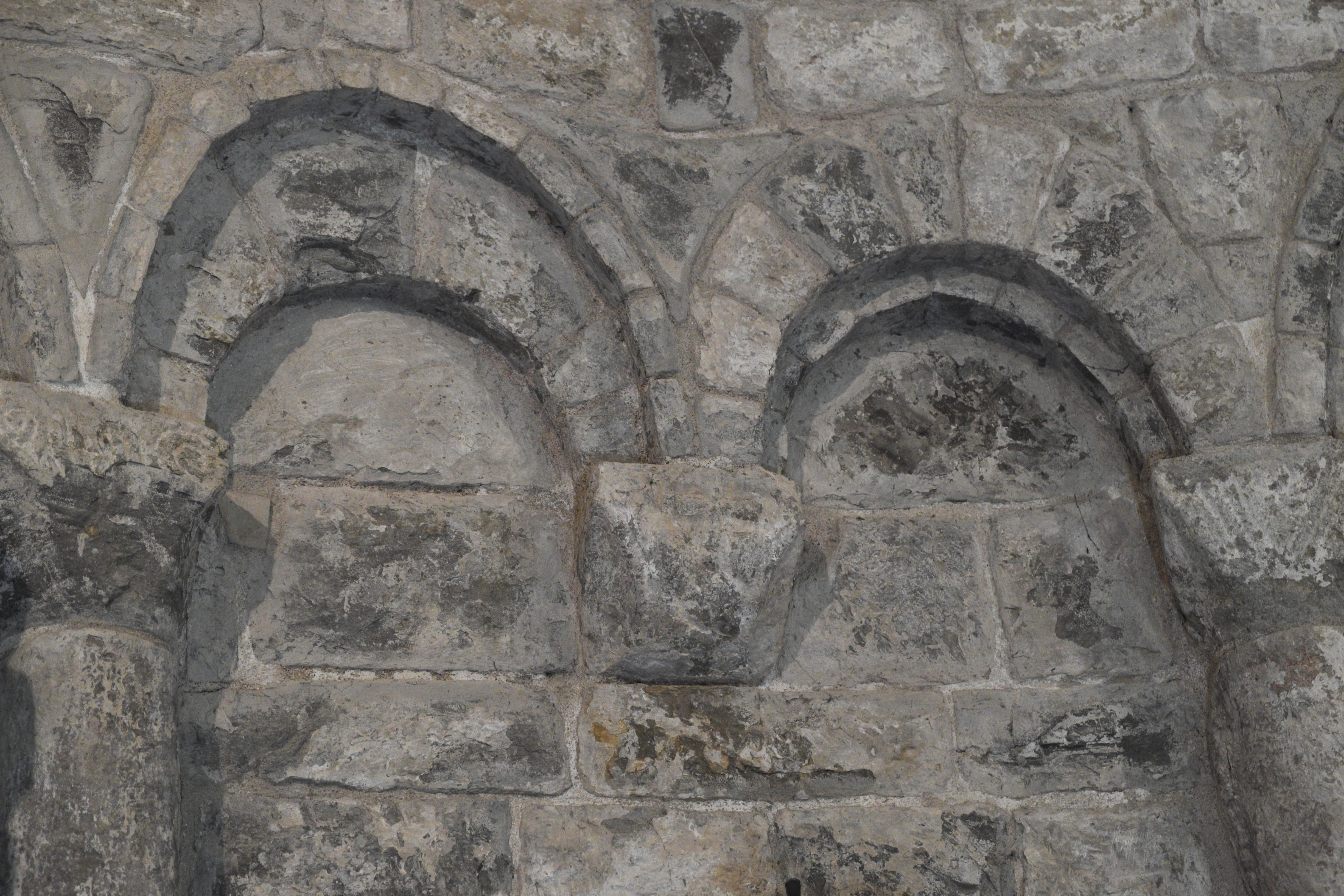 Ehemalige Benediktinerklosterkirche Santa María des Klosters Santa María de Obarra in Beranuy in der Provinz Huesca (Aragón/Spanien), Konsole in der Apsis